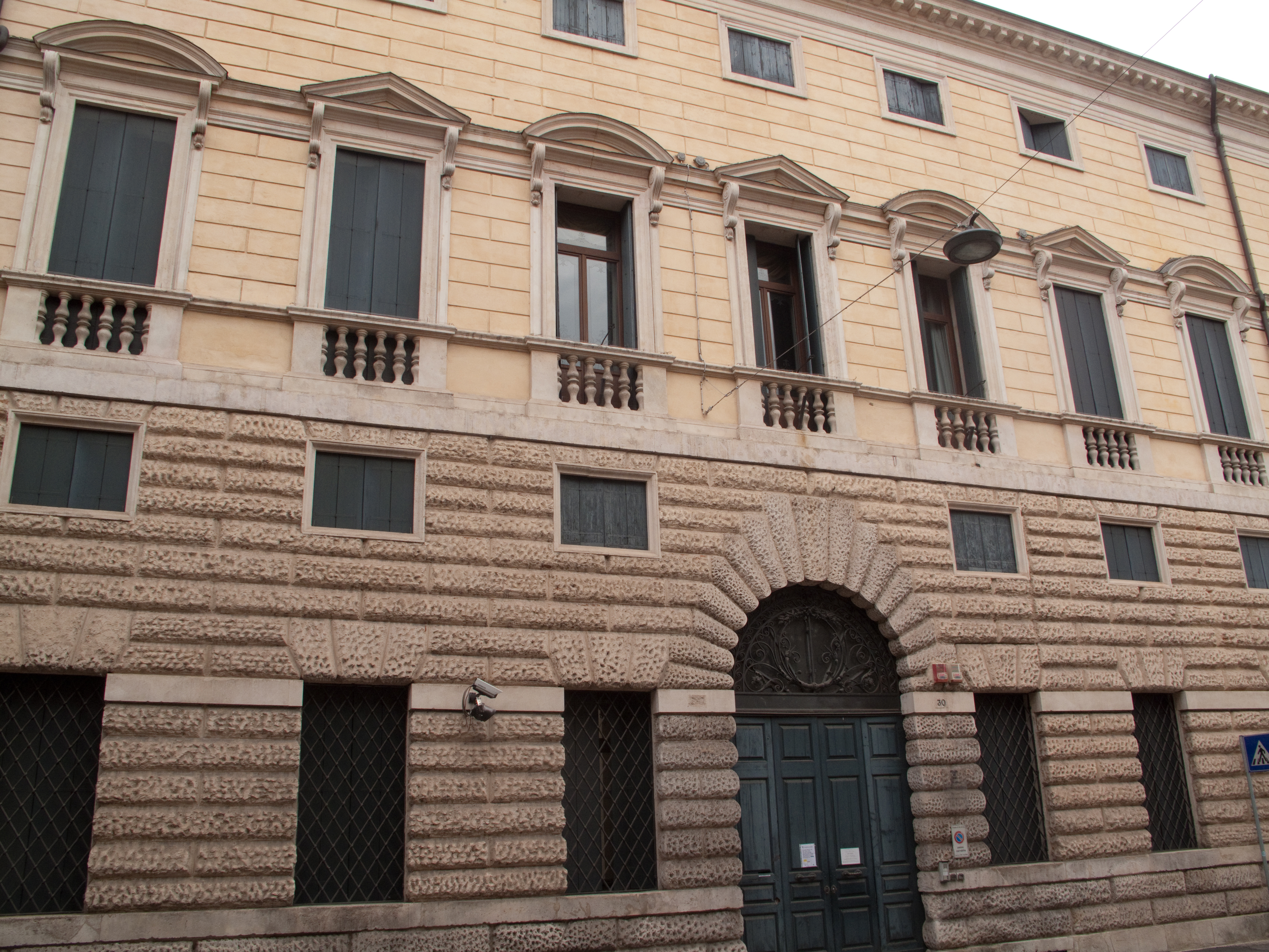 Vicenza Palazzo Franceschini Folco